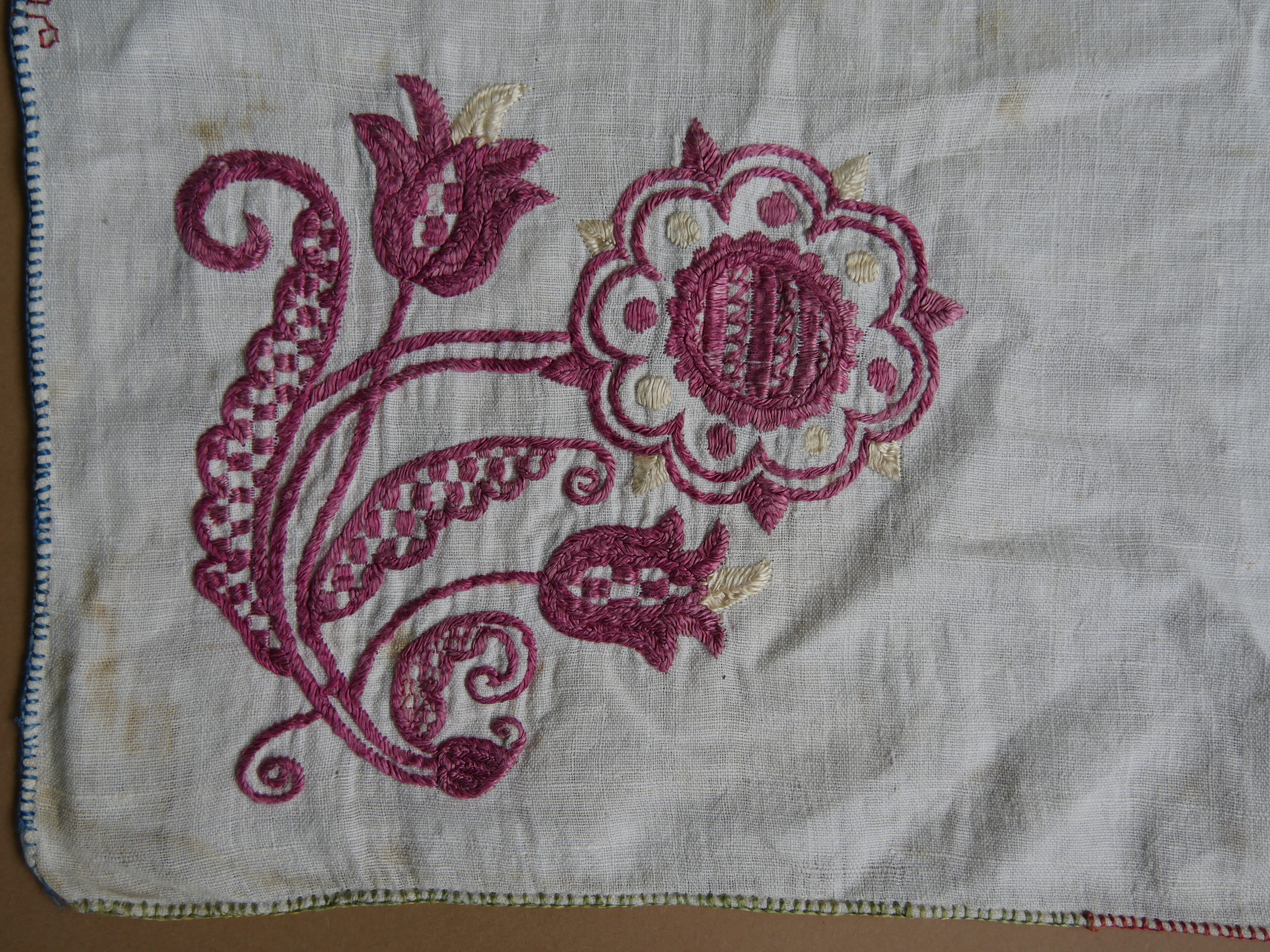 19. századi patyolat vászonra selyem fonallal hímzett erdélyi terítő sarka.